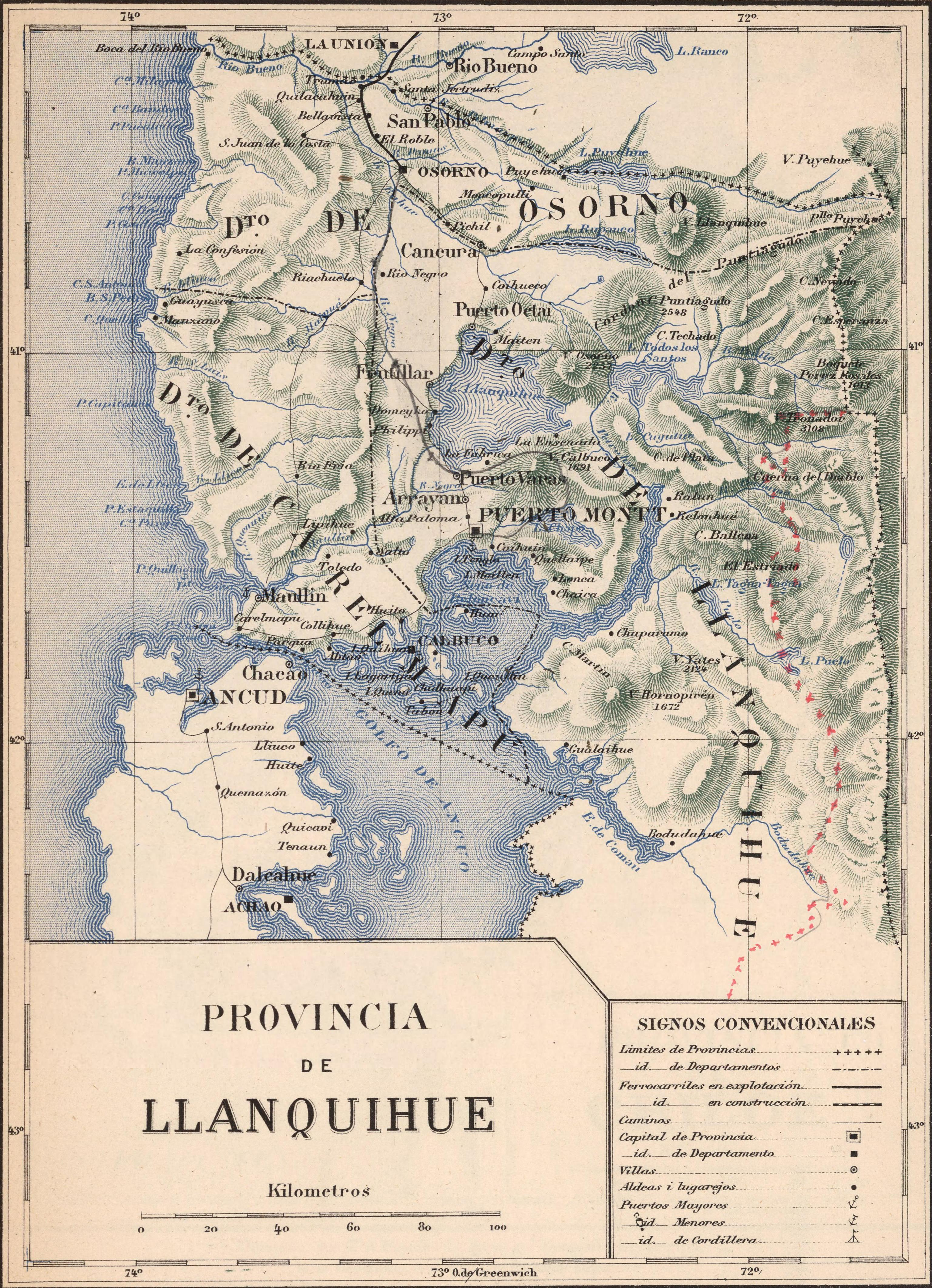 Atlas de Chile Arreglado para la Jeografia Descriptiva de la Republica de Chile por Enrique Espinoza.